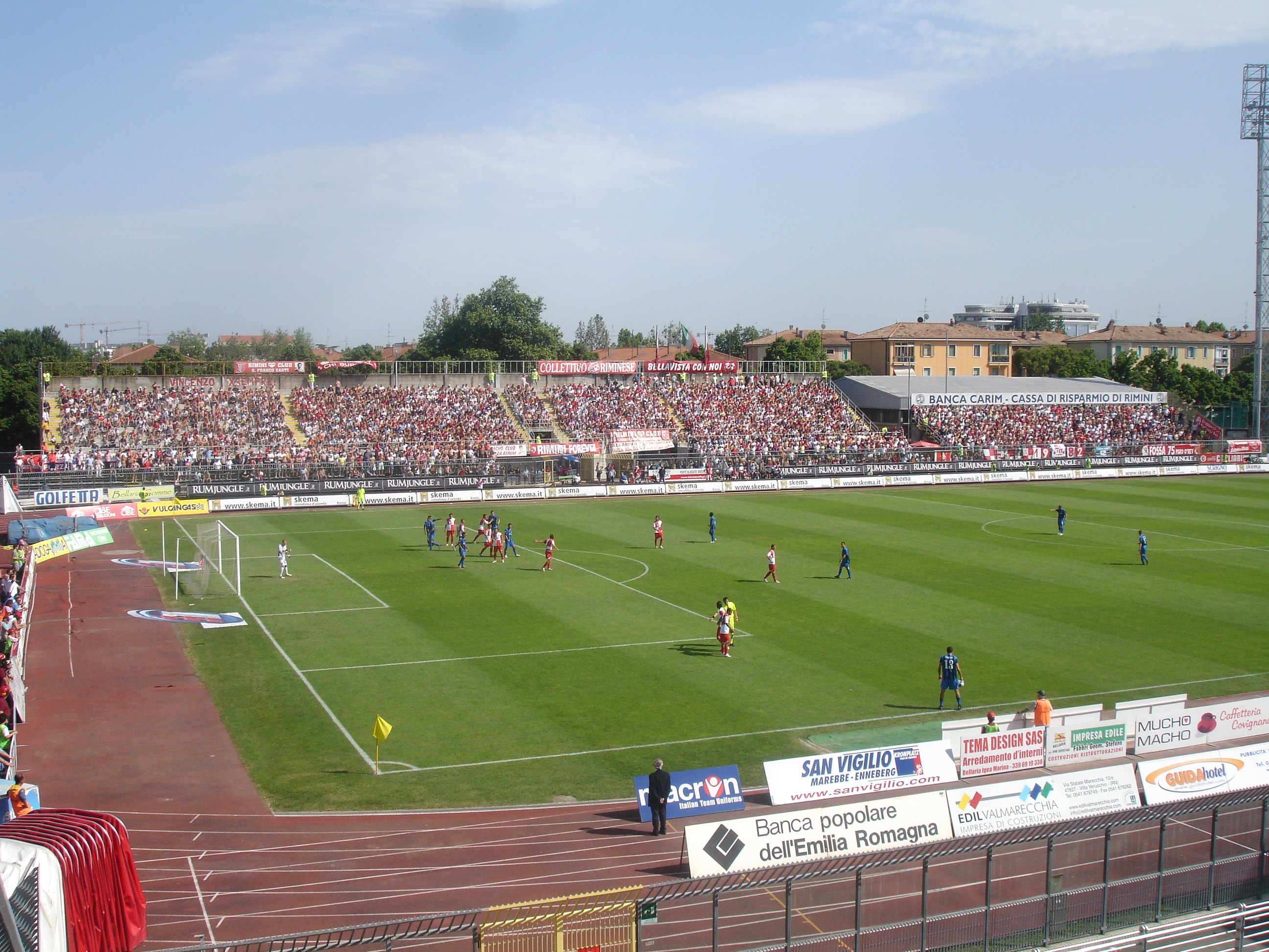 Scorcio dello stadio Romeo Neri di Rimini. Immagine scattata durante l'incontro Rimini-Pisa, campionato di serie B 2008/09.